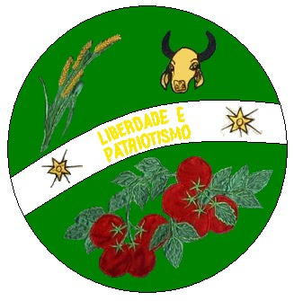 Brasão de Goianápolis, Goiás, Brasil.